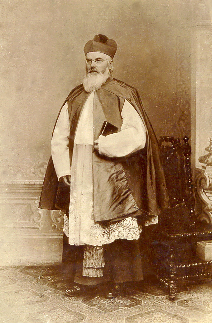 Johann Martin Schleyer, Konstancja, ok. 1900 r.